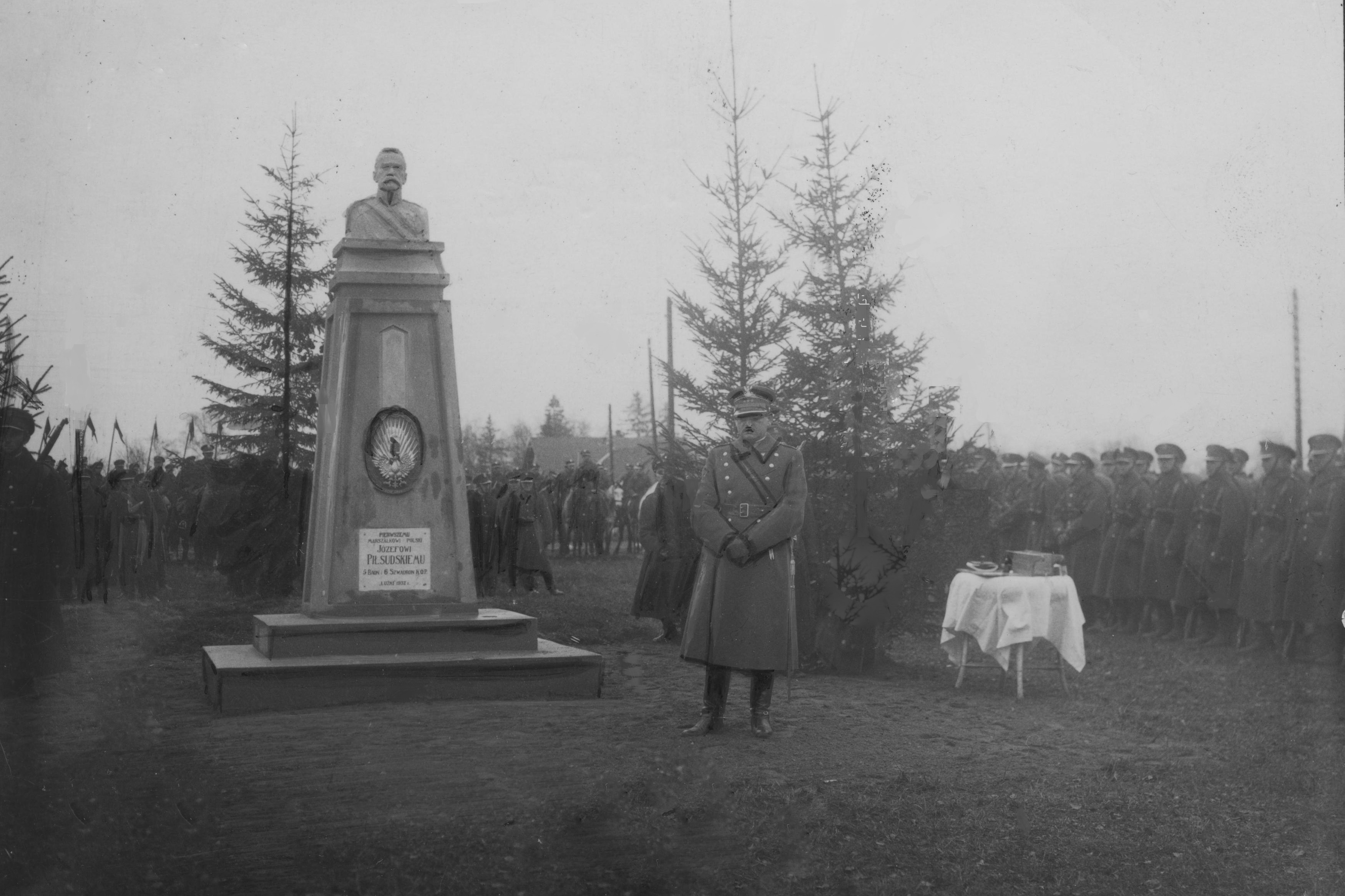 Pomnik Józefa Piłsudskiego odsłonięty, przez żołnierzy 5 Batlionu Korpusu Ochrony Pogranicza "Łużki" w dniu Święta Niepodległości w Łużkach. Koncern Ilustrowany Kurier Codzienny - Archiwum Ilustracji